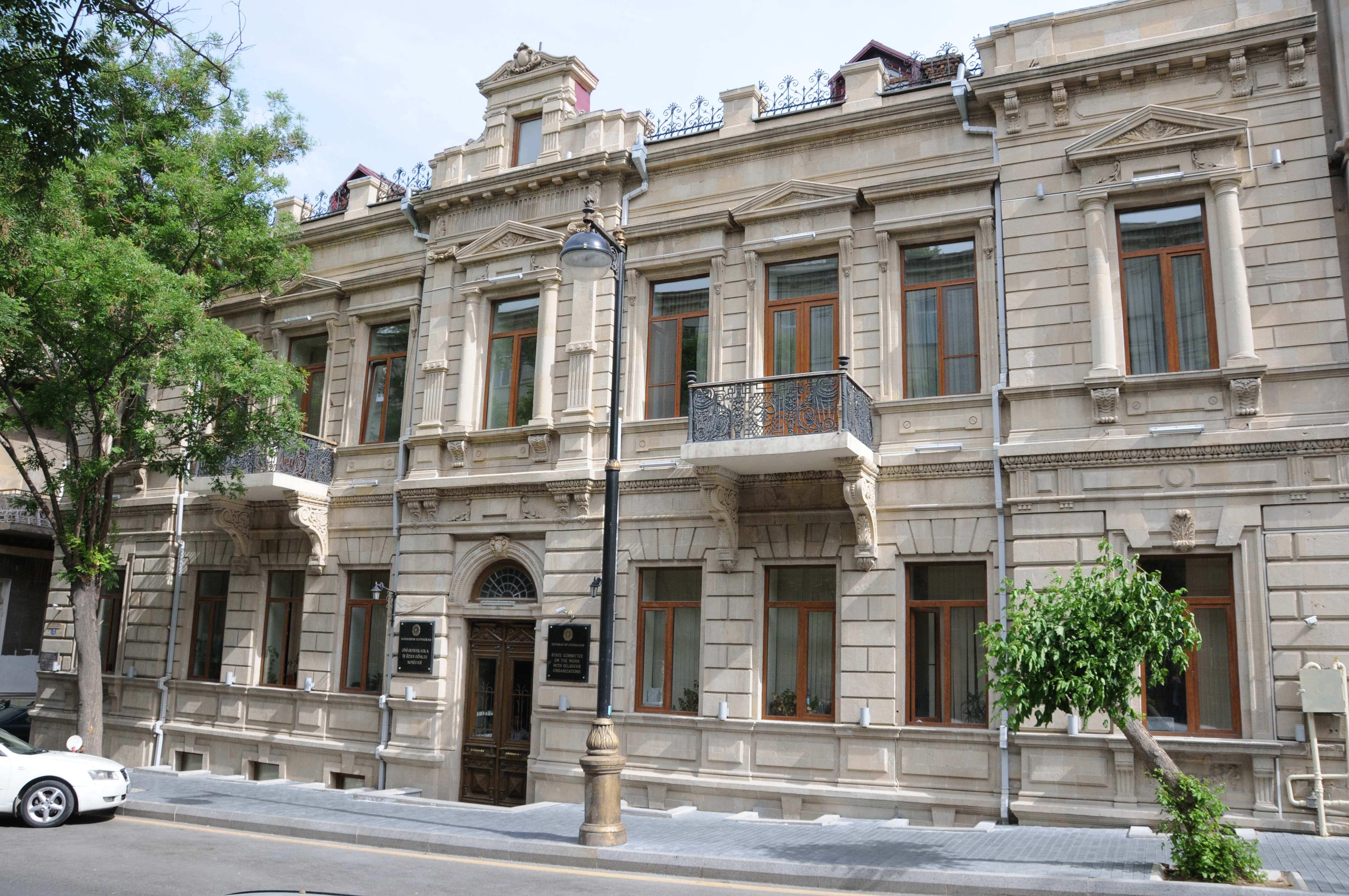 DQİDK Mərkəzi Aparat